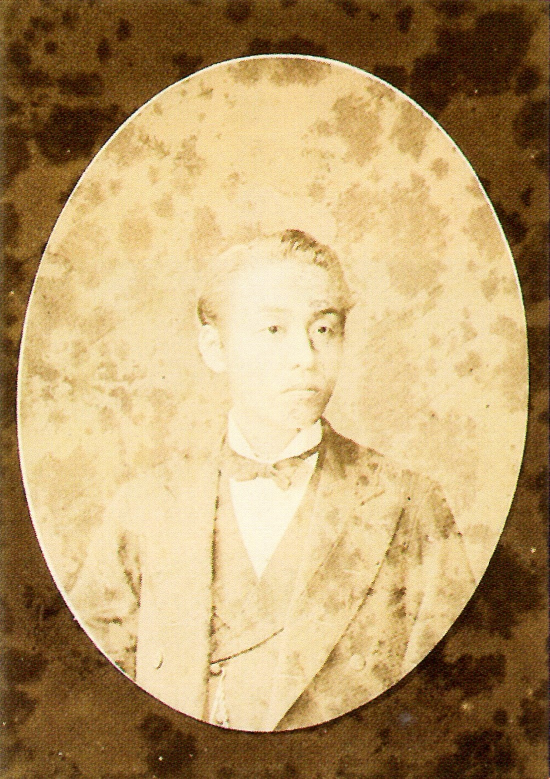 稲葉正善の肖像写真。